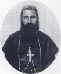 Addai Scher, chaldäisch-katholischer Erzbischof von Siirt